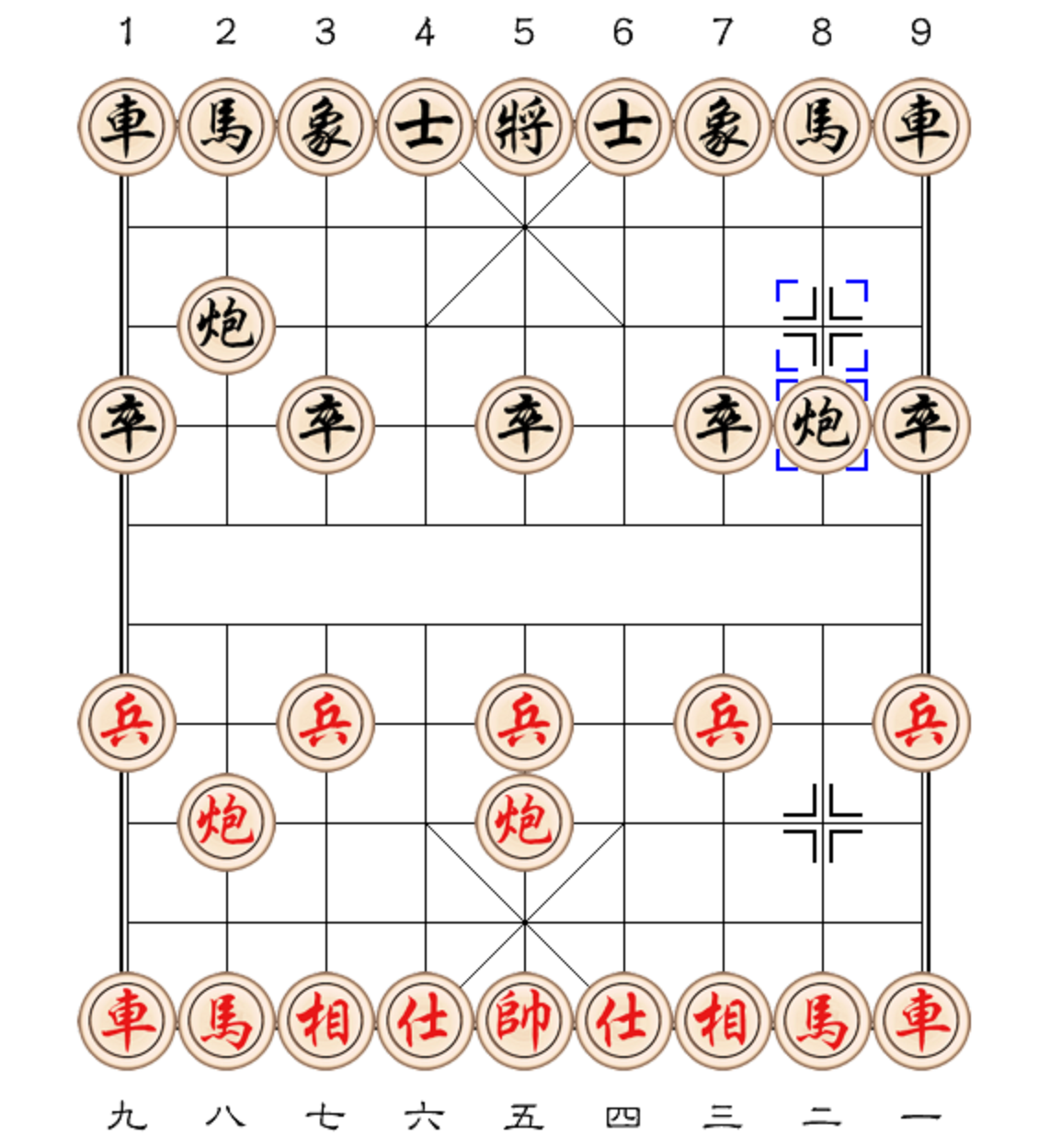 Tả điệp